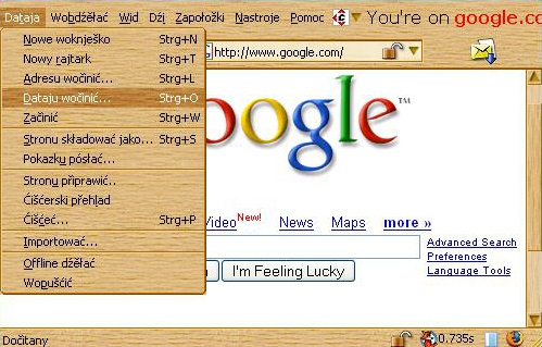 wobhladowak (browser)